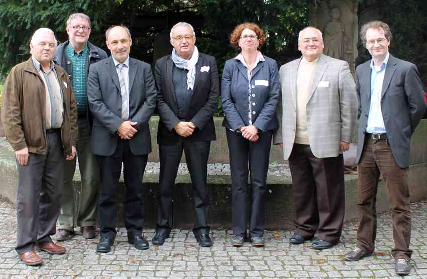 Comité trinational 2014-2016 des Netzwerks Geschichtsvereine